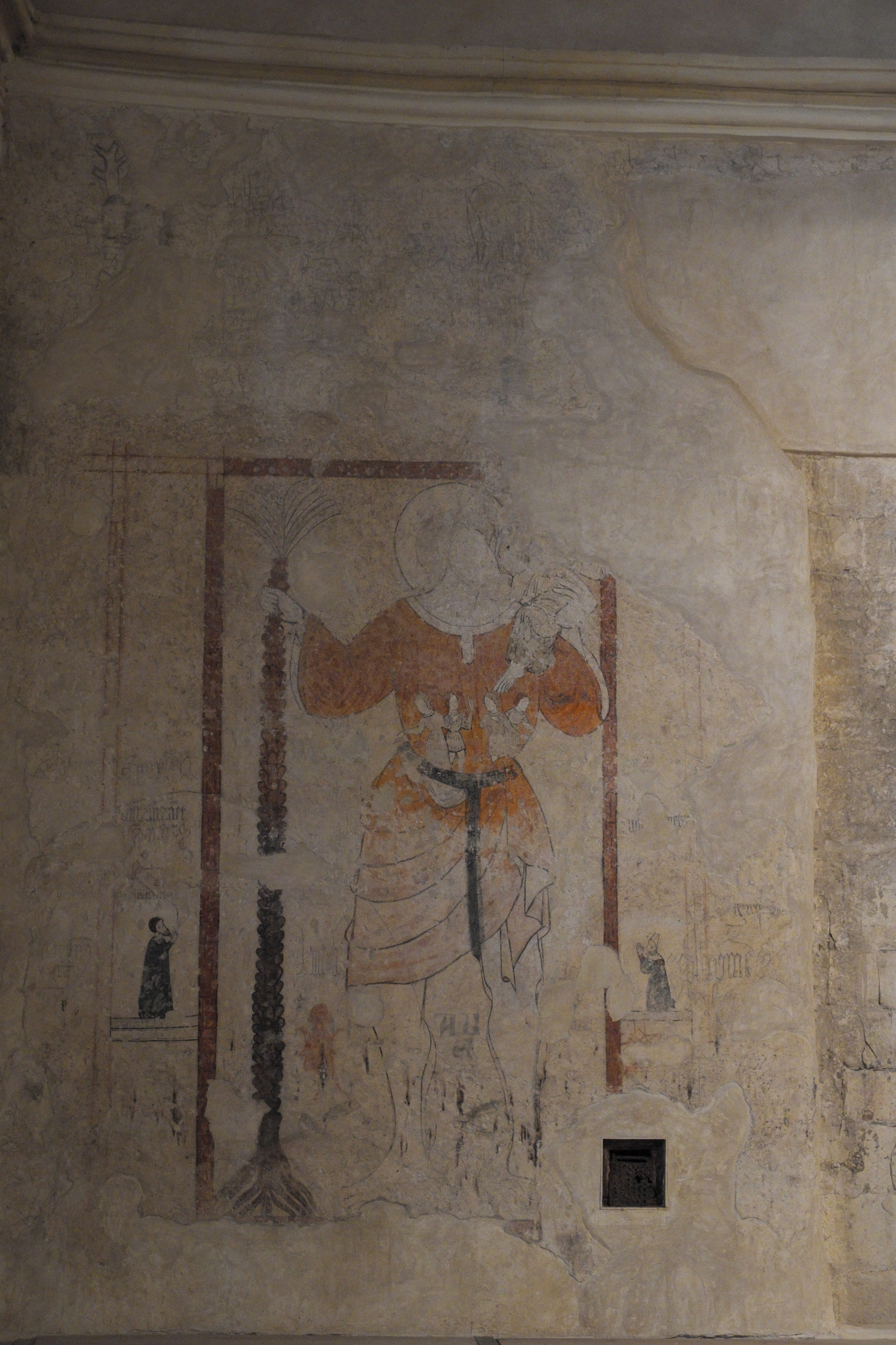 Katholische Pfarrkirche Nuestra Señora de la Soterraña, Kirche des ehemaligen Dominikanerklosters in Santa María la Real de Nieva in der Provinz Segovia (Kastilien-León/Spanien), Wandmalerei aus dem ersten Drittel des 15. Jahrhunderts, Darstellung: hl. Christophorus